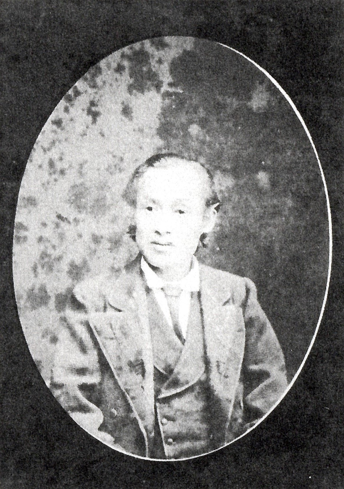 滋野井公寿の肖像写真。